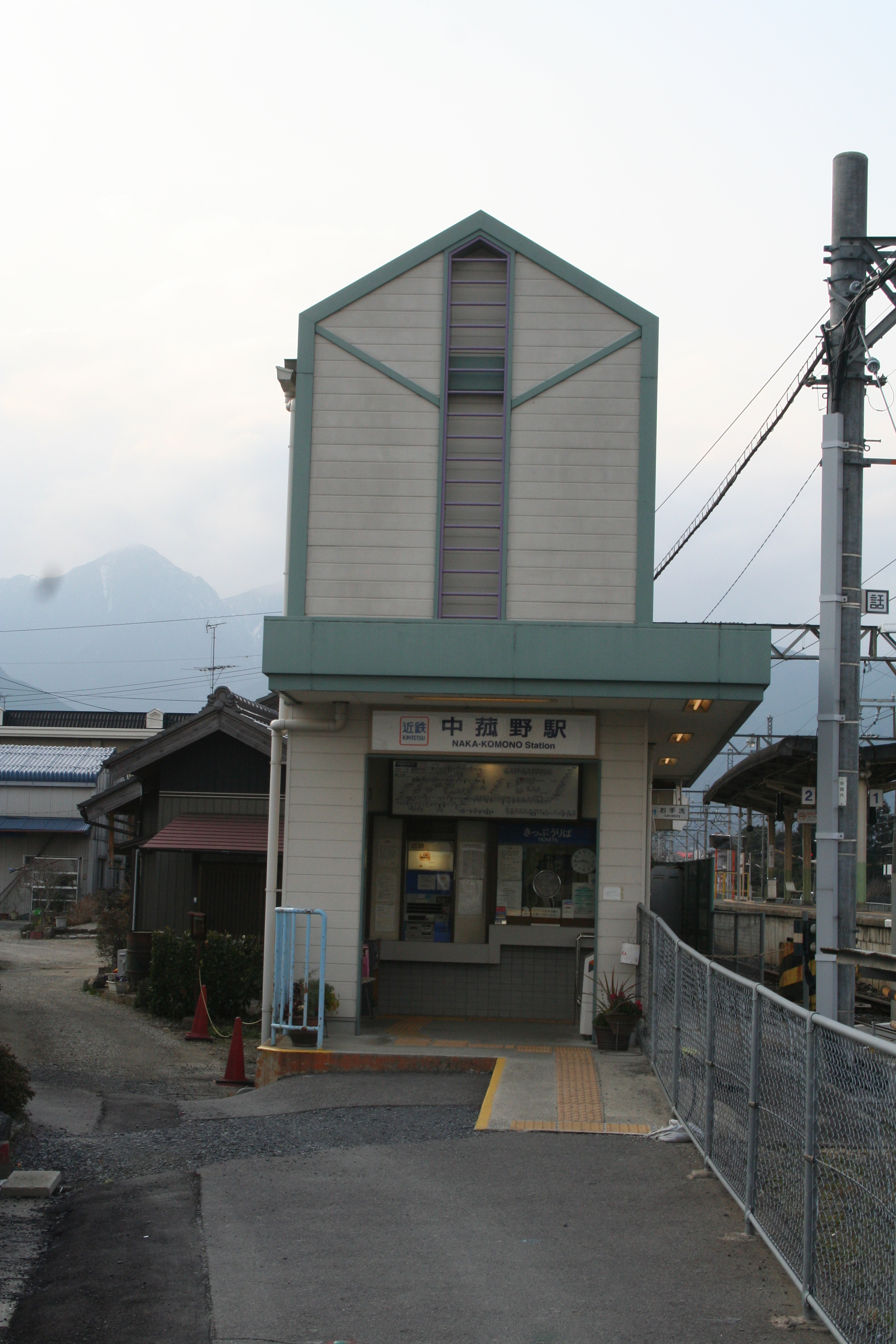 近鉄･中菰野駅